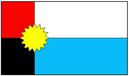 La bandera pertenece al municipio de Pinto, Santiago del Estero, Argentina. Fue creada mediante Resolucion 107/04